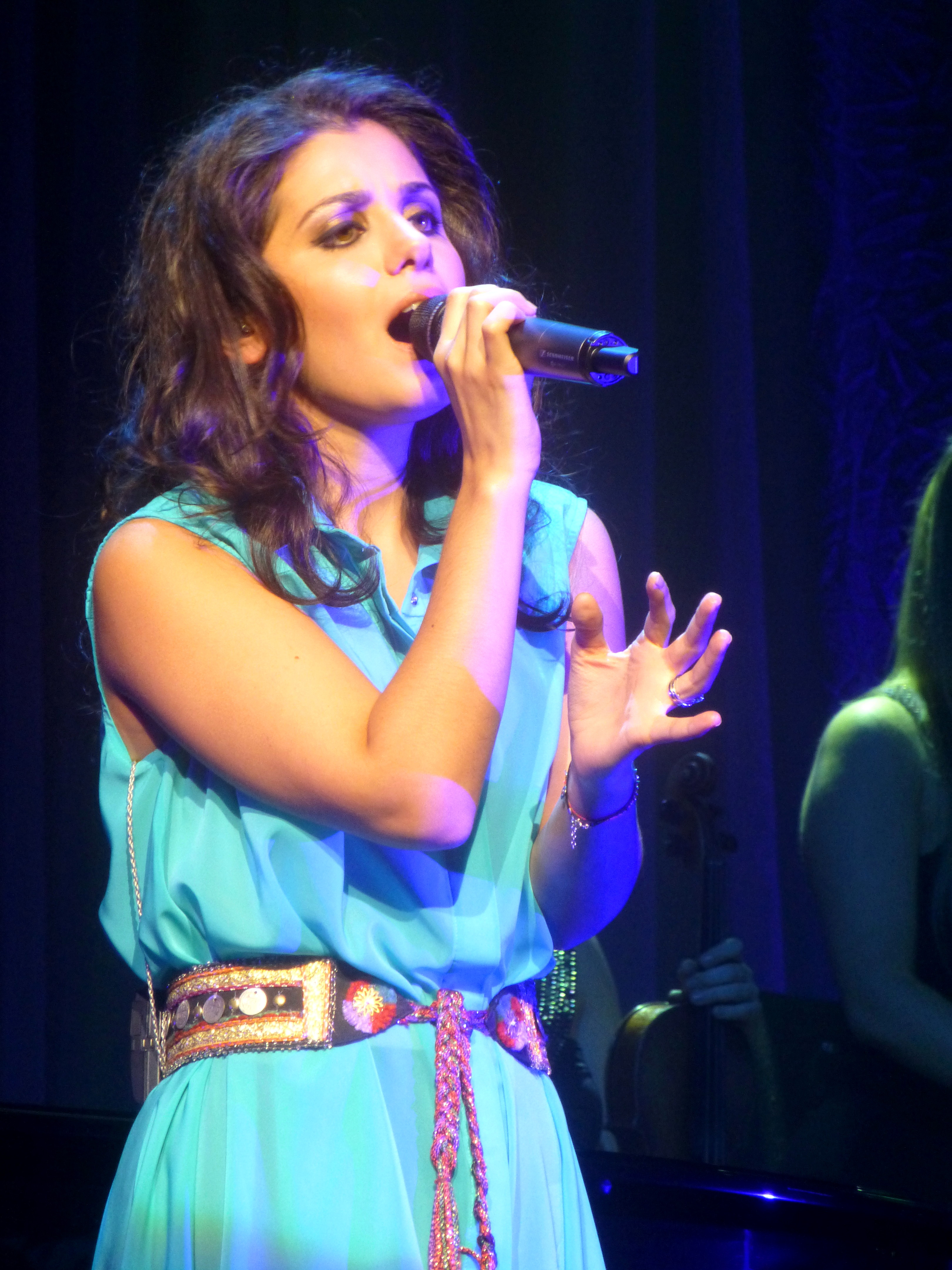 Katie Melua en concert au palais des congres à Paris dans le cadre de sa pro de son nouvel album " secret symphonie "